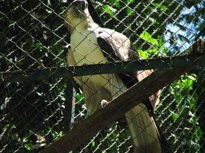 Pag-asa, The Philippine Eagle Center, Malagos, Baguio District, Davao City, Philippines